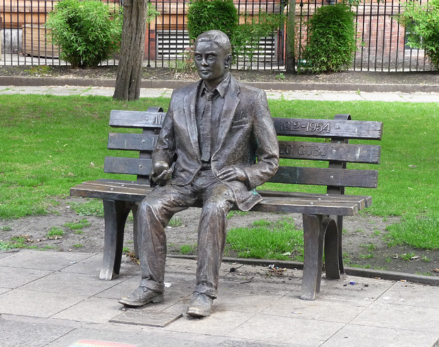 Turing statue, Sackville Gardens, Manchester